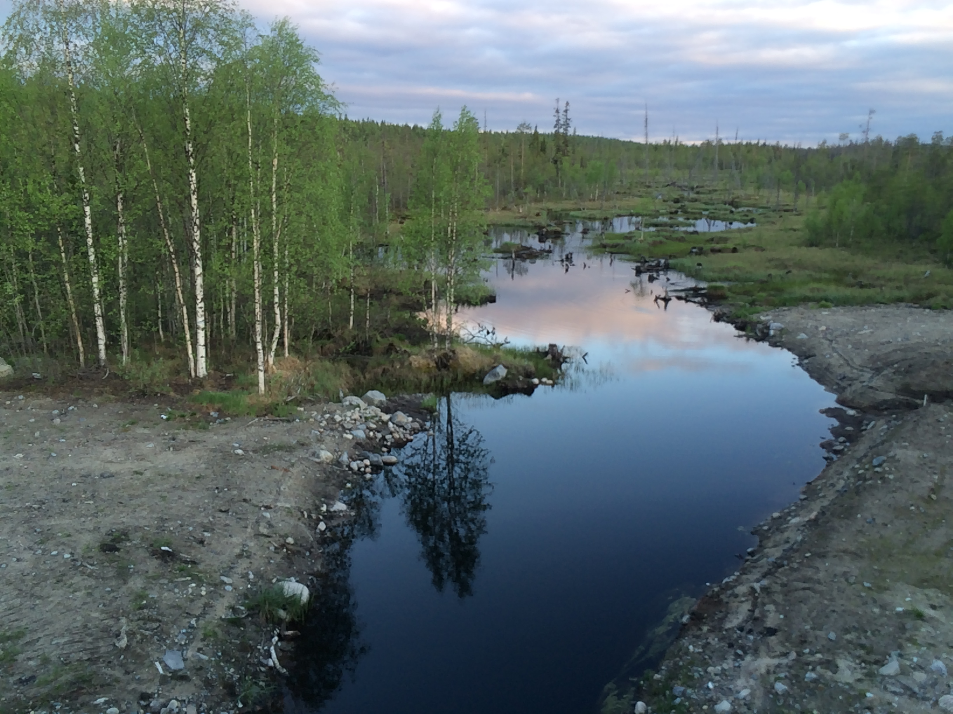 Чёрный (приток Егута)